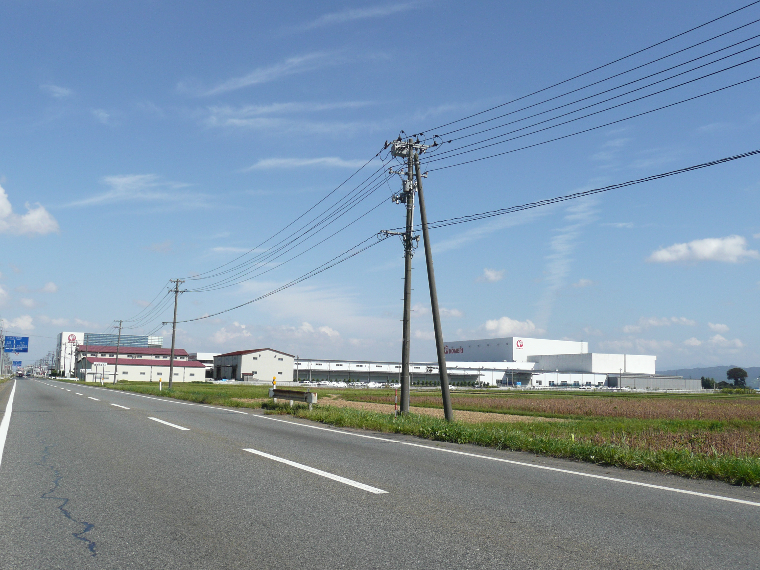 コメリ 本社（左）・白根流通管理センター（右）。新潟県新潟市南区。The head office of Komeri Co., Ltd. in Minami-ku, Niigata, Niigata, Japan.